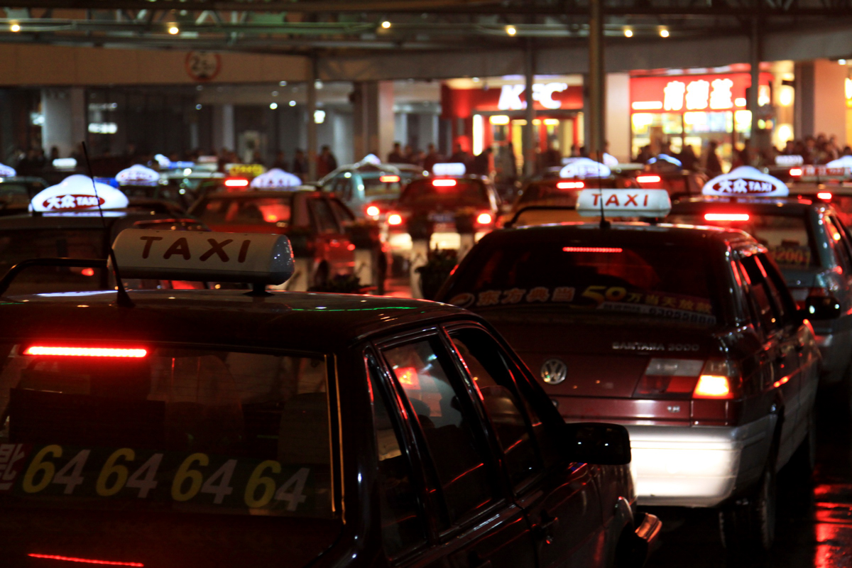 Shanghai Hongqiao Airport, Taxi stop